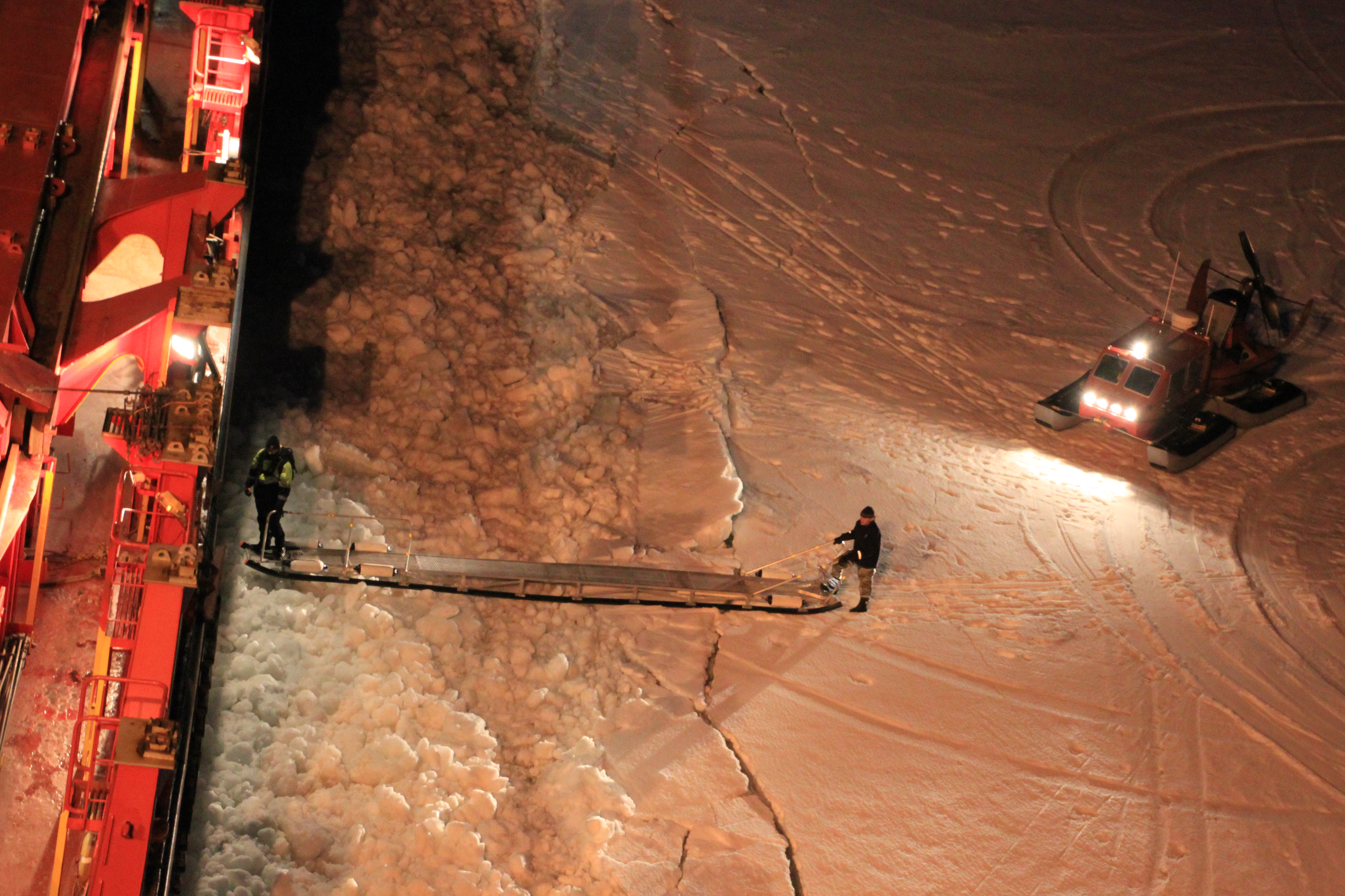 Lotsenwechsel vor Oulu mit Hydrocopter